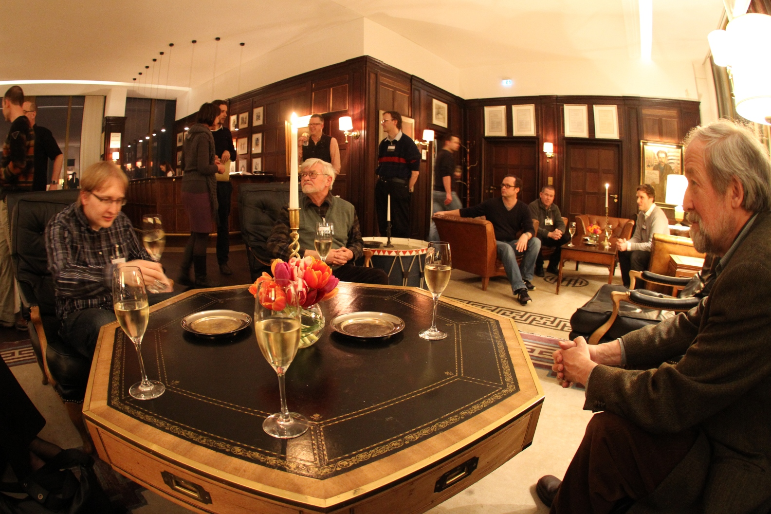 Ein Gespräch zwischen Wikipedia und Springer